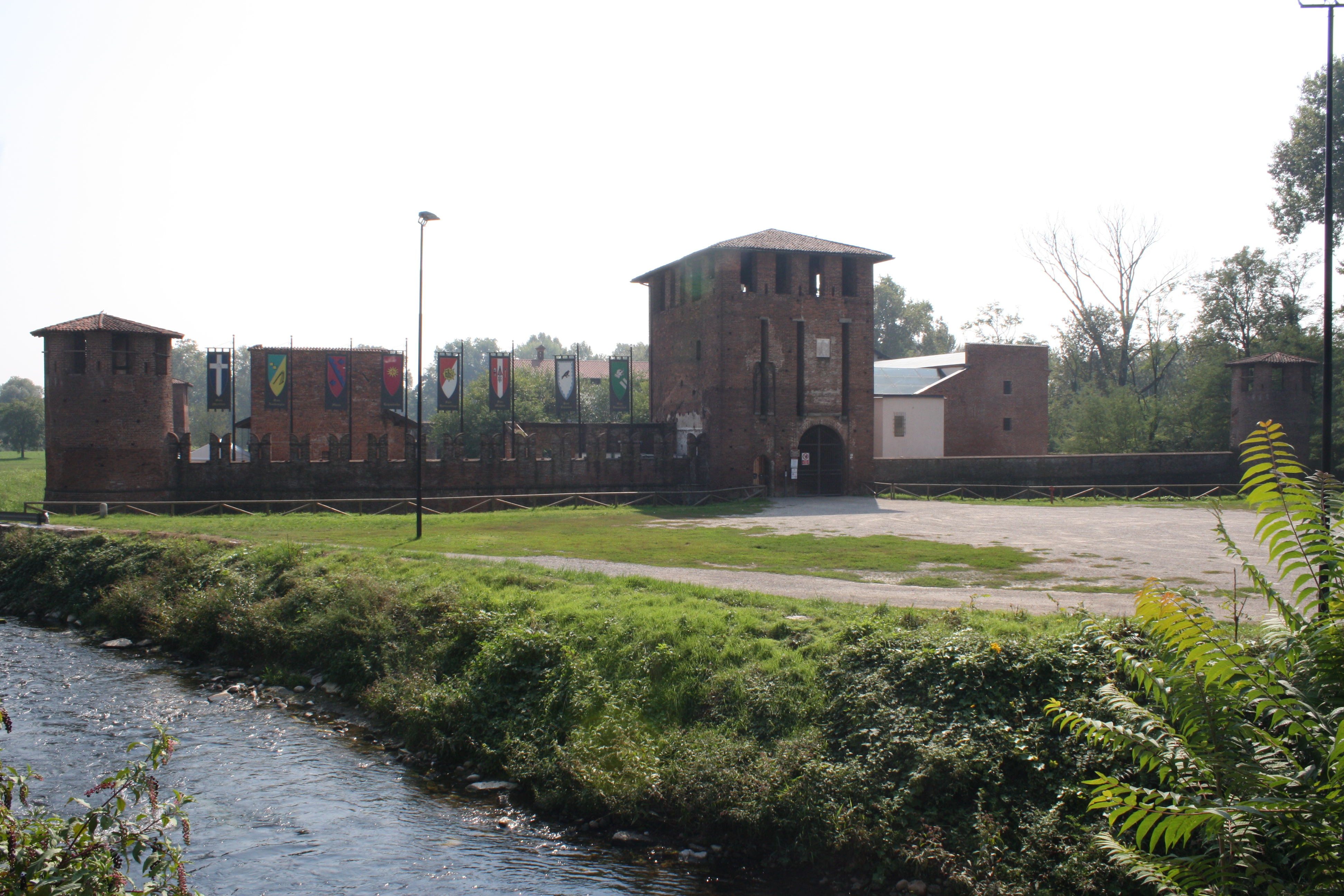 Castello di San Giorgio This is a photo of a monument which is part of cultural heritage of Italy.